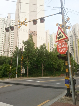 건널목